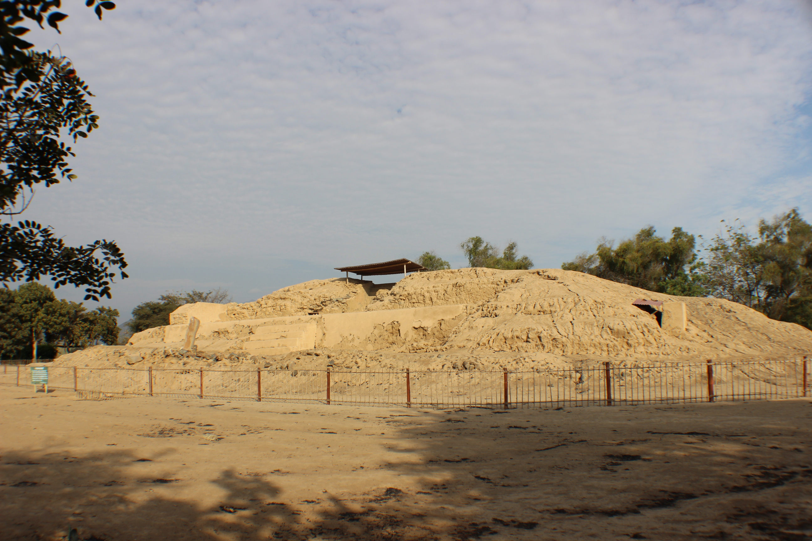 Santuario andino costeño de tierra, tiene pintura mural, relieves y escultura de bulto, polícromos, fue centro de peregrinación durante el desarrollo de la Cultura Sechín en Ancash, Perú hace 4,000 años.